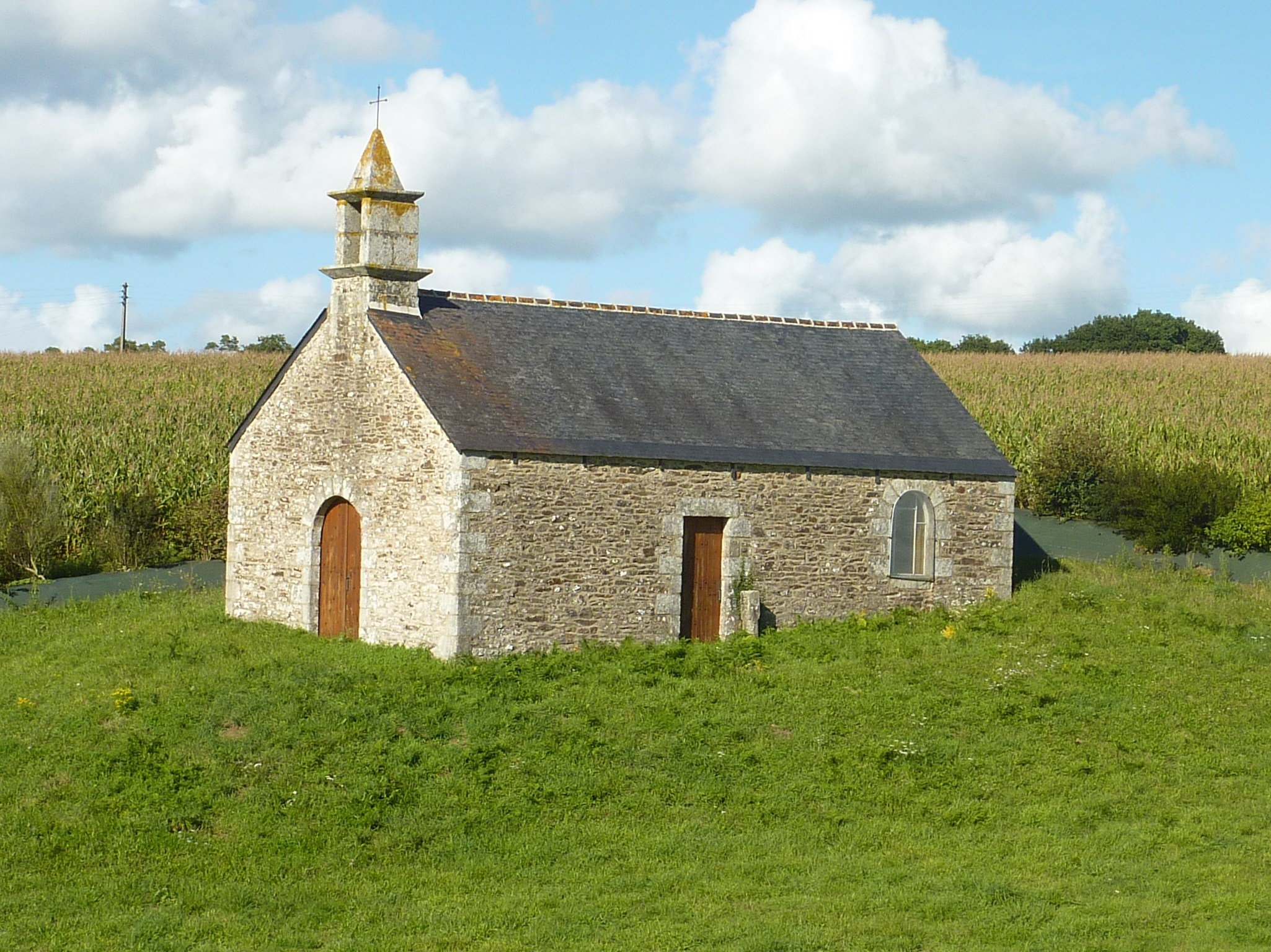 Poullaouen: la chapelle Saint-Victor, perdue dans la campagne.